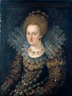 Portrait of Barbara Sophie of Brandenburg (1584-1636)